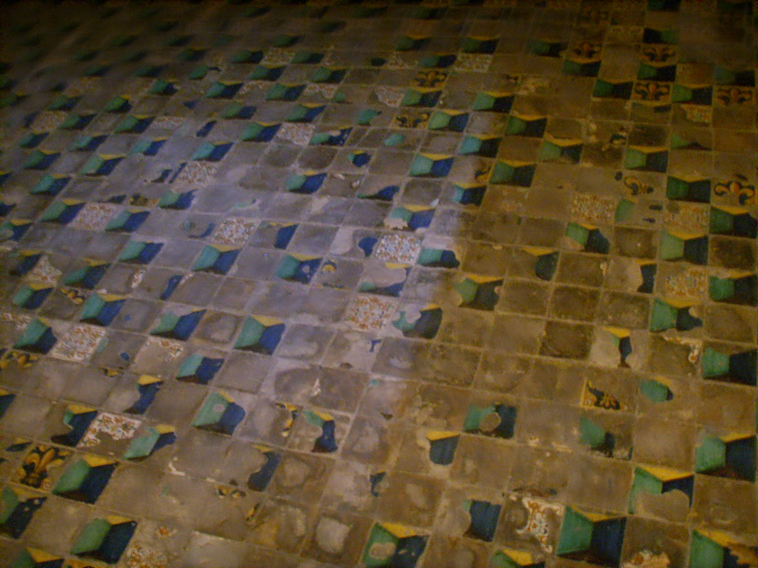 Villa Medicea di Careggi, inside in Florence, Italy